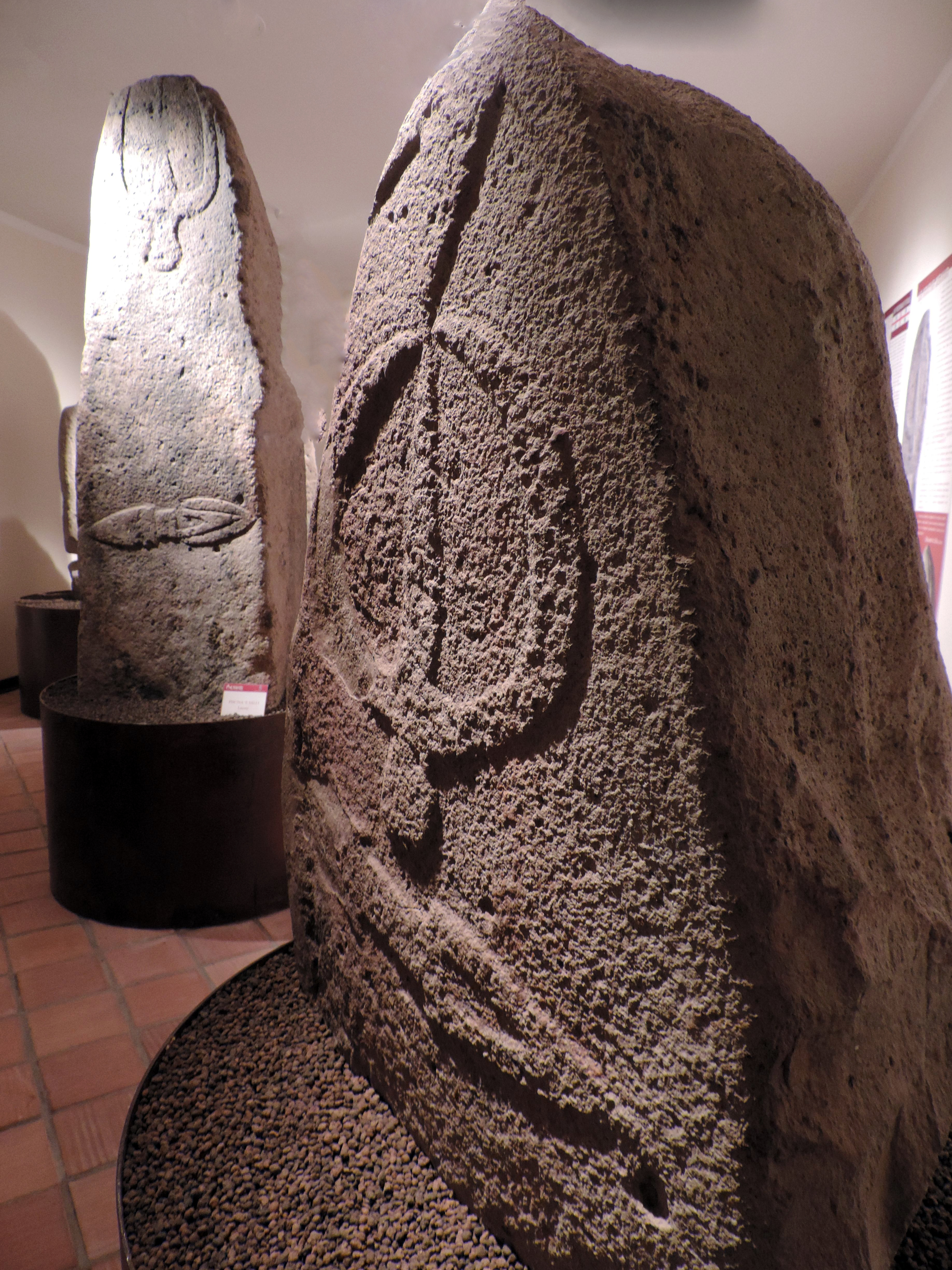 Museo delle Statue Menhir - Palazzo Aymerich This is a photo of a monument which is part of cultural heritage of Italy.